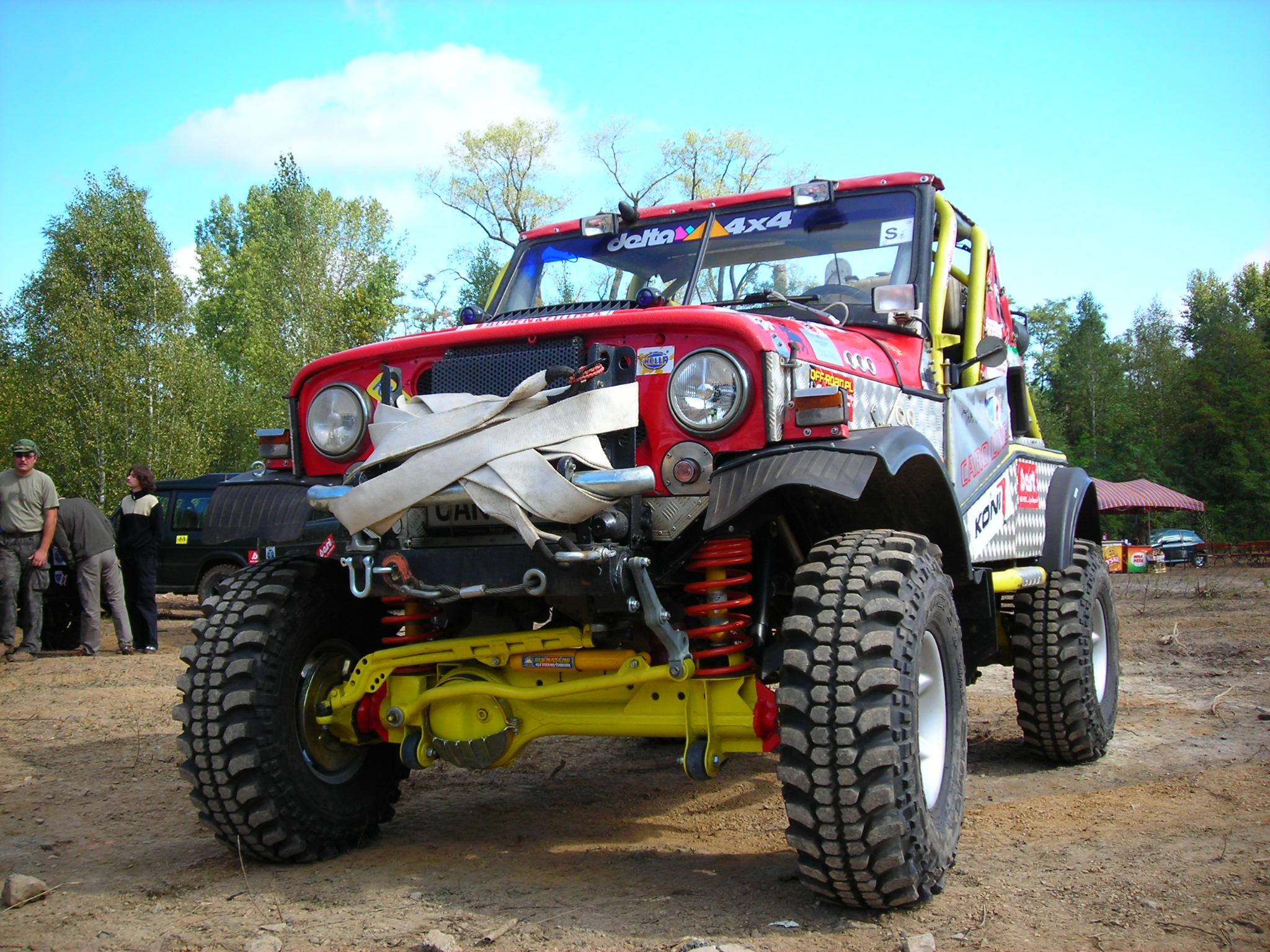 Zawody samochodów terenowych w Jaworznie Pieczyskach.